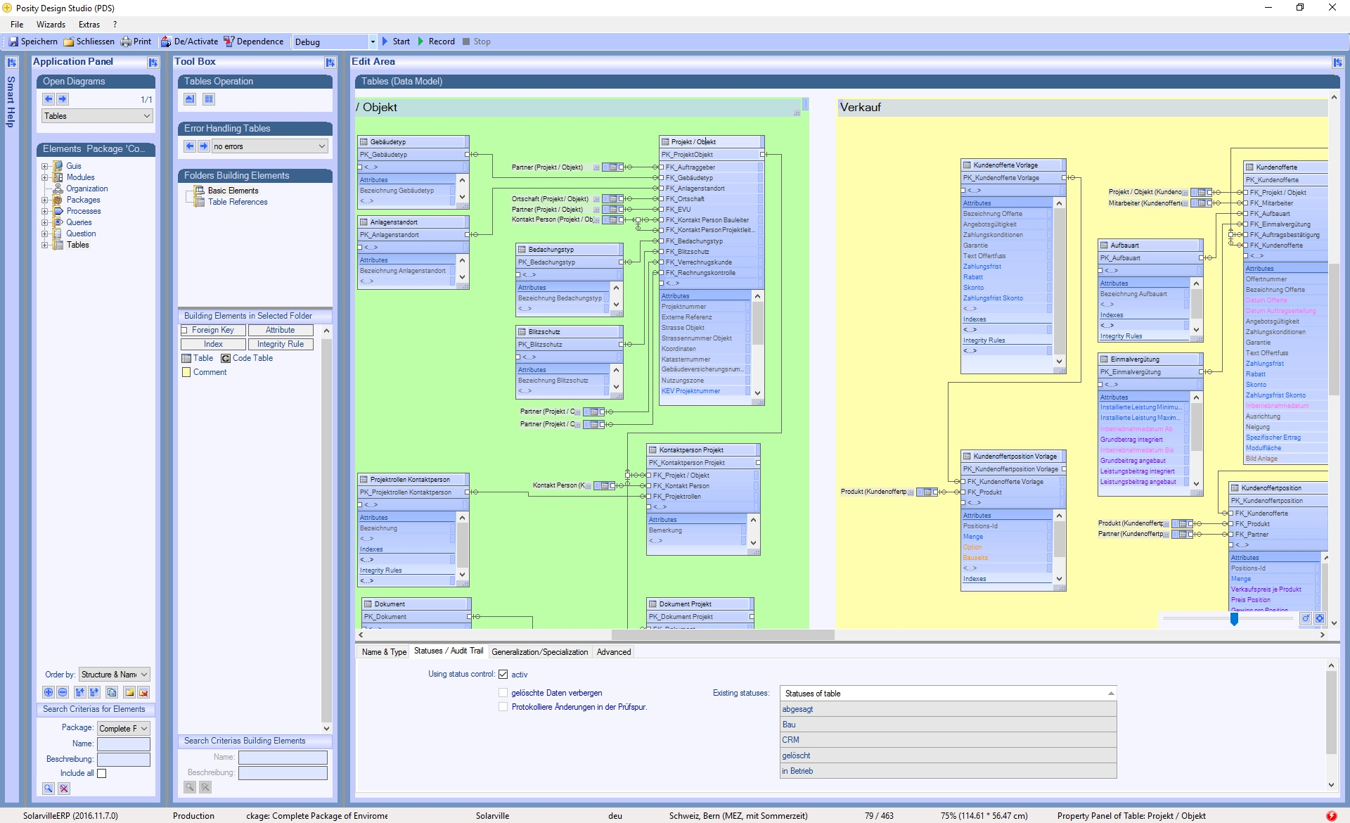 Posity Design Studio